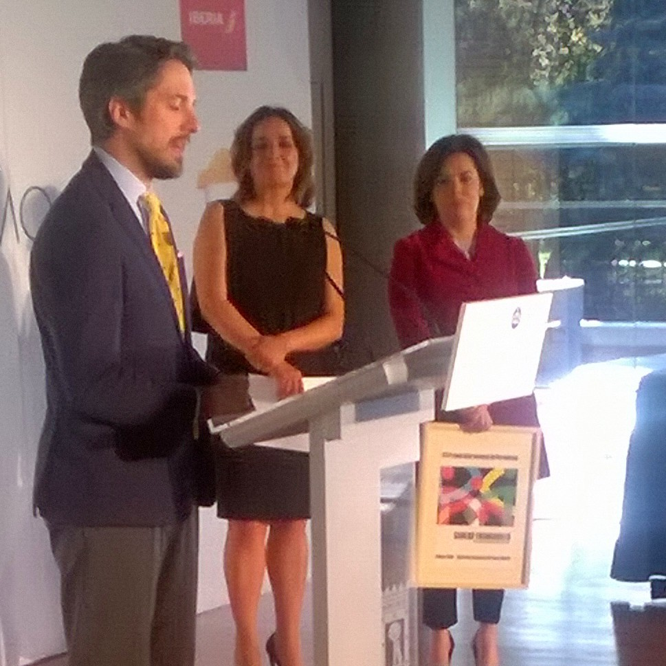 Carlos Franganillo agrdece el Premio del Club Internacional de Prensa, en presencia de Pepa Bueno y la vicepresidenta Soraya Sáenz de Santamaría